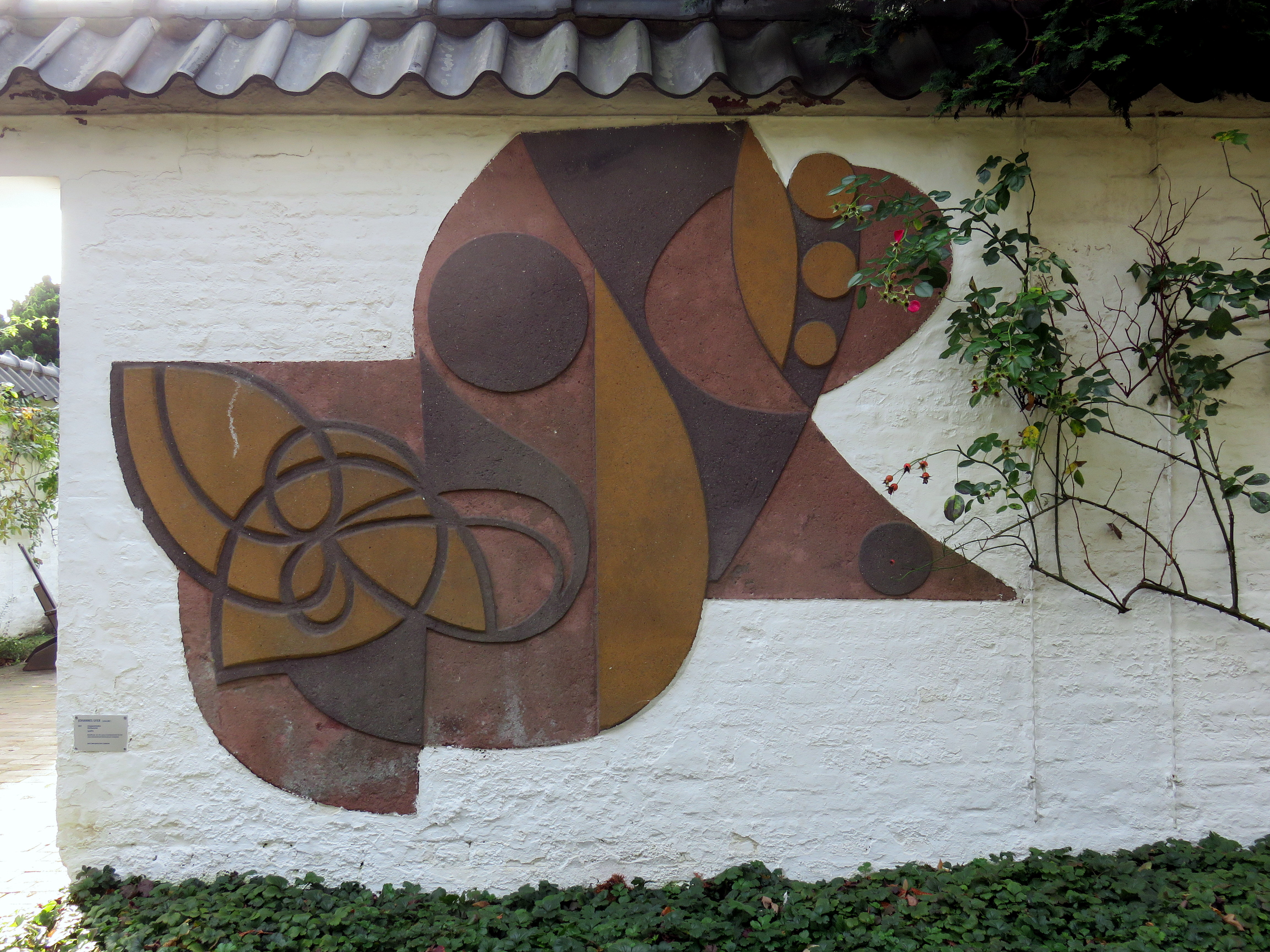 Sgraffito Ungegenständlich des deutschen Malers und Bildhauers Johannes Ufer anlässlich der Internationalen Gartenbauausstellung (IGA) von 1953. Standort: Im nördlichen Bereich der Hamburger Parkanlage "Planten un Blomen" beim Apothekergarten nahe Eingang Tiergartenstraße.